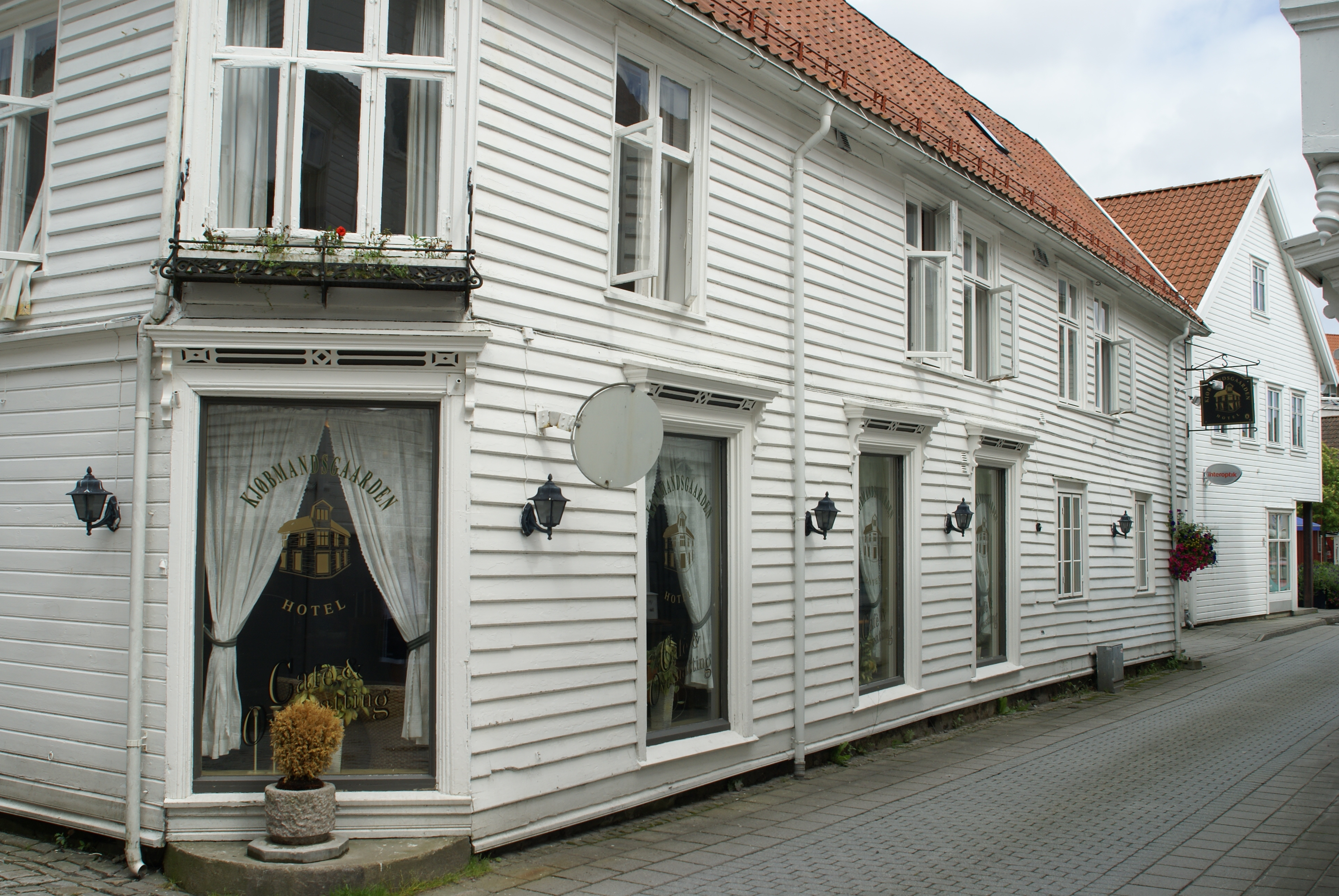 Kjøbmandsgaarden i Mandal